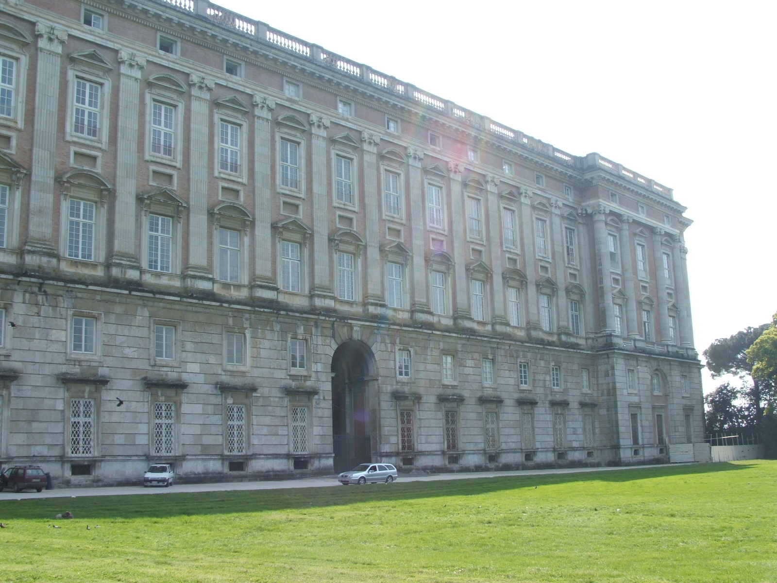 Immagine dalla Reggia di Caserta, Caserta, Campania, Italia. Il Parco